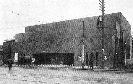 葵館、1924年ころの写真